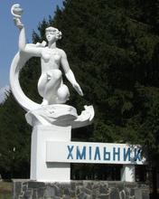 Хмельник въезд